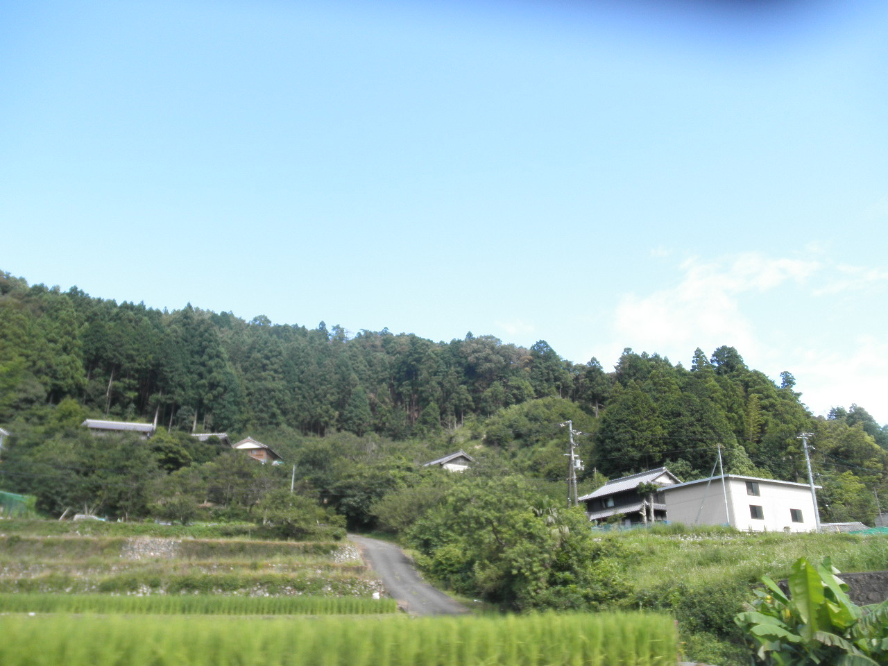 徳島県海部郡美波町赤松高瀬